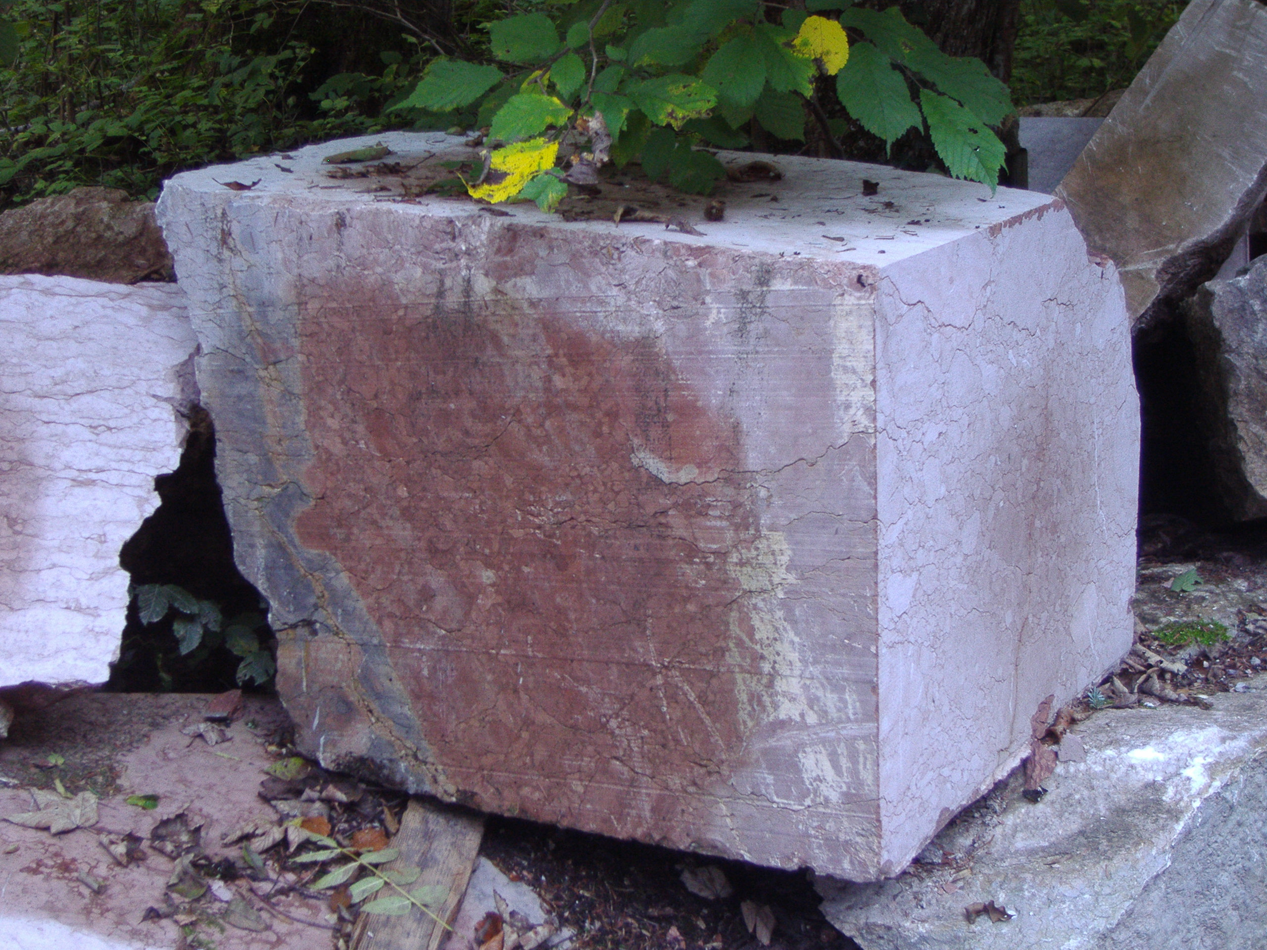 Block aus Adneter „Marmor“ (Kalkstein), Österreich.